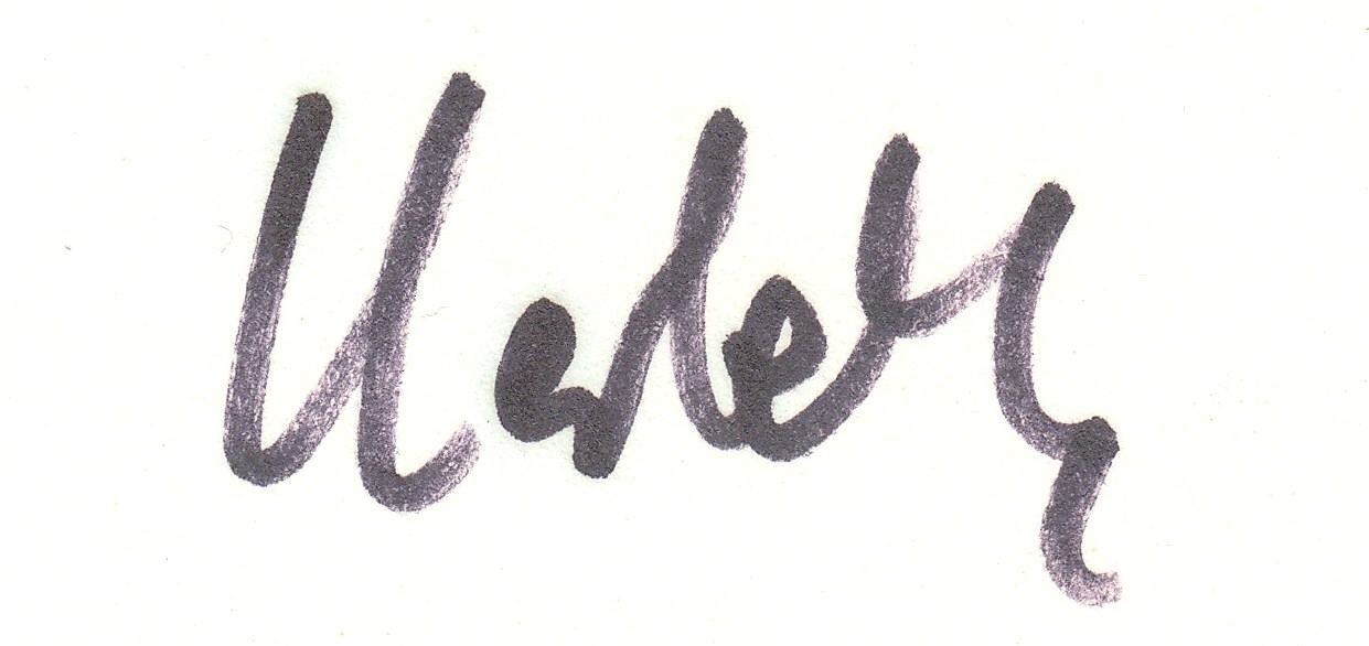 Autogramm des ehem. Bundesliga-Spielers von 1977